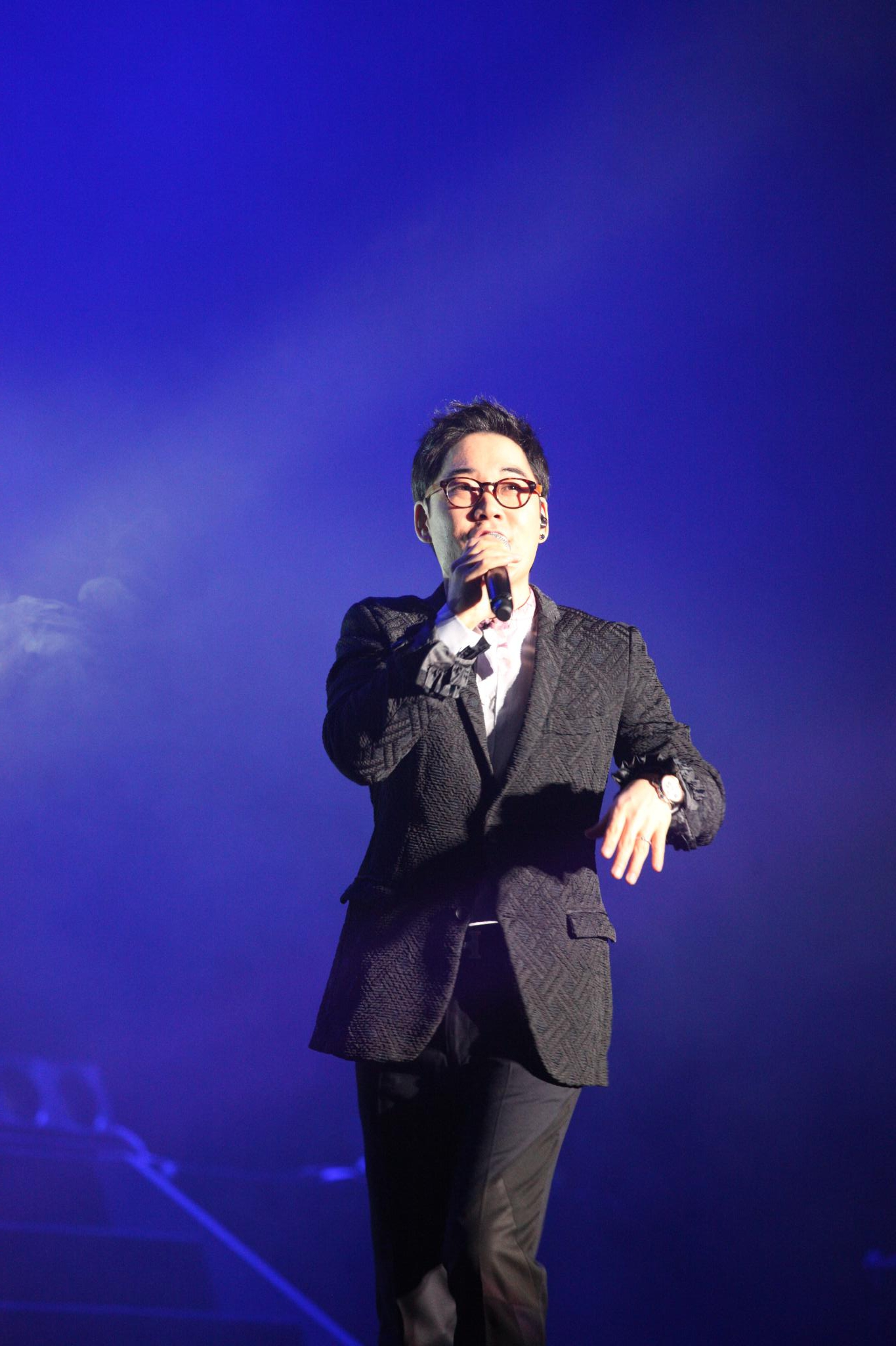 싸이월드 공감 페스티벌_081